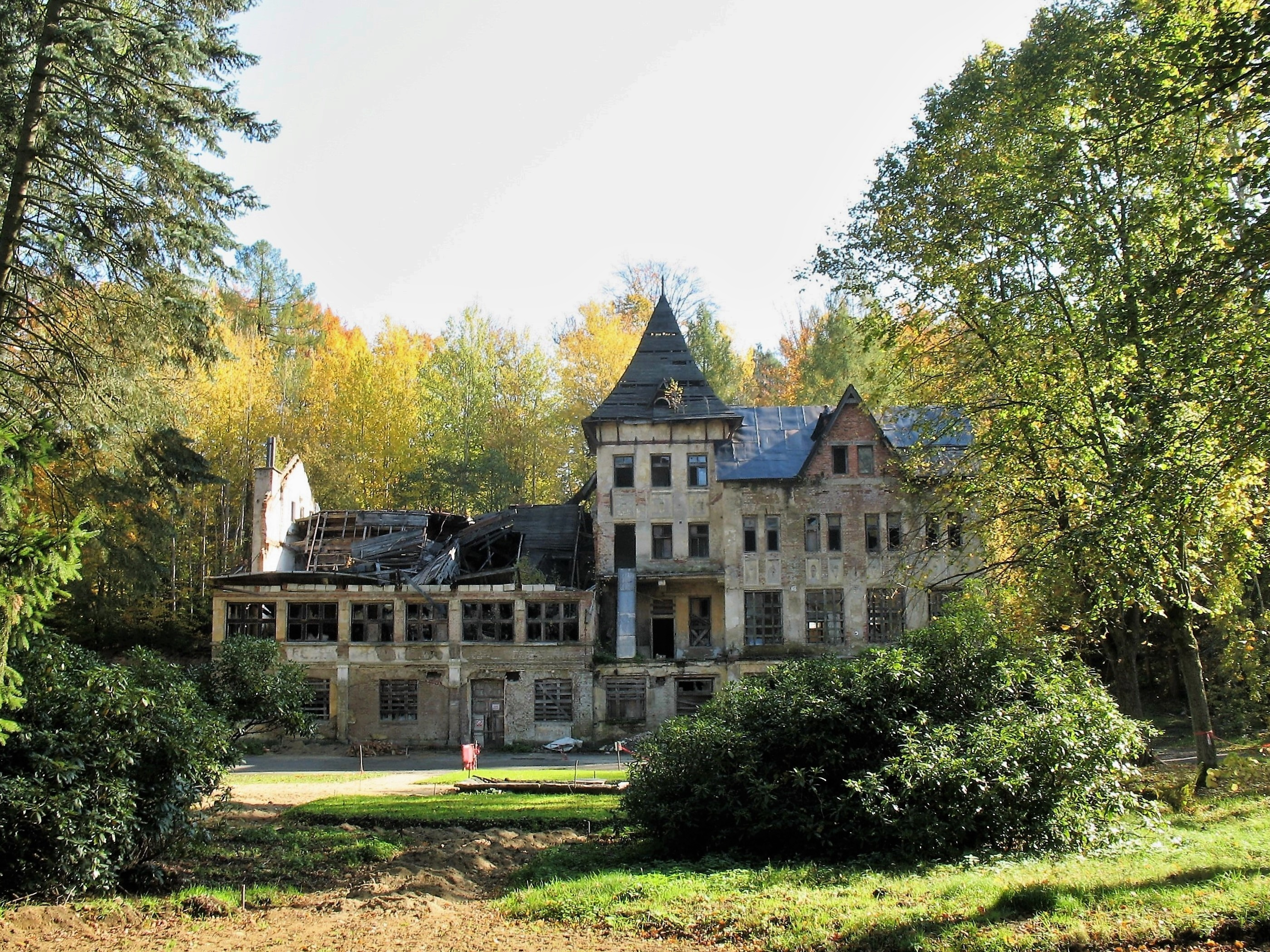 Budova bývalých slunečních lázní v Karlově údolí u Šluknova